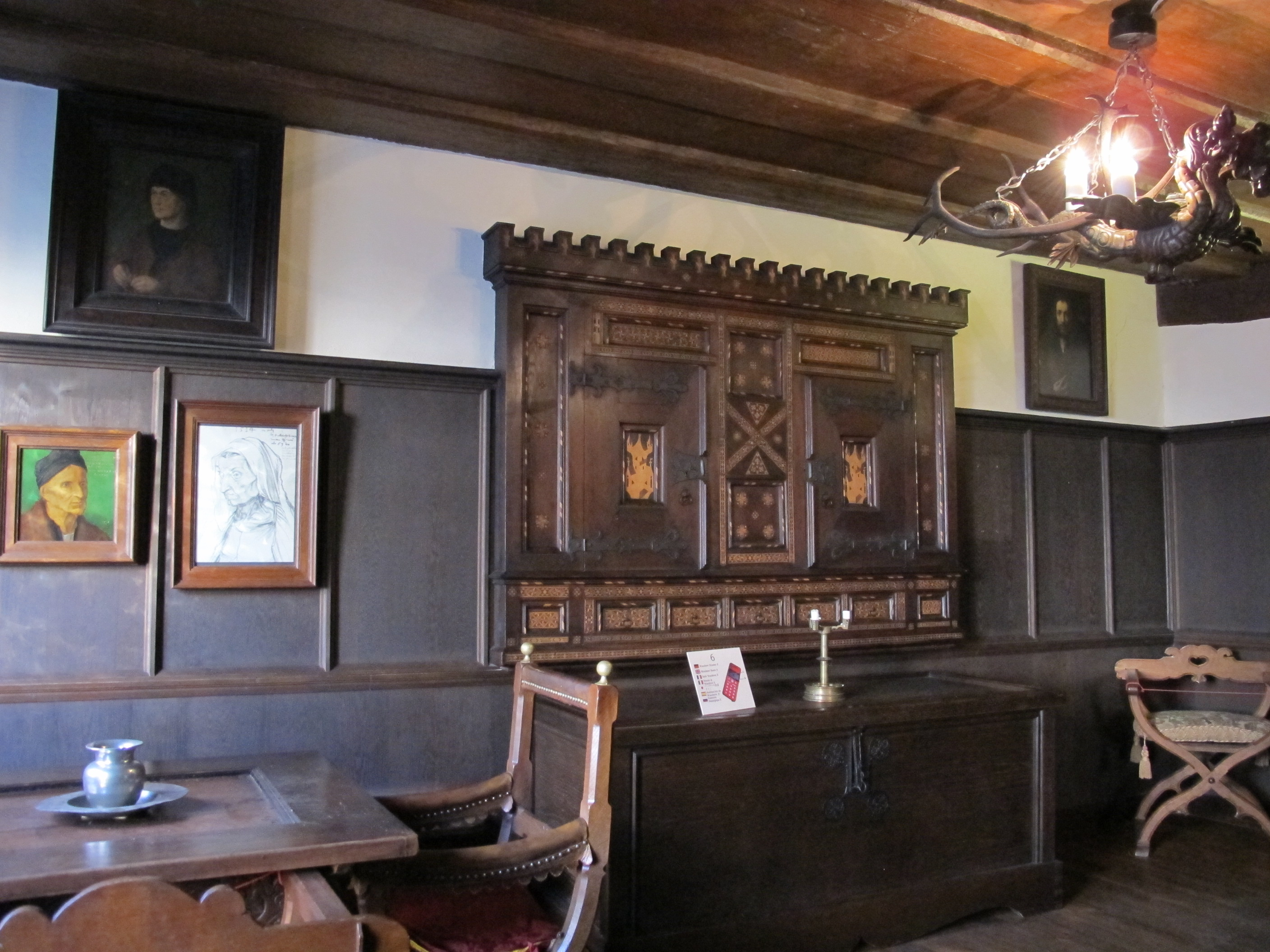 Albrecht-Dürer-Haus, interno 02 sala